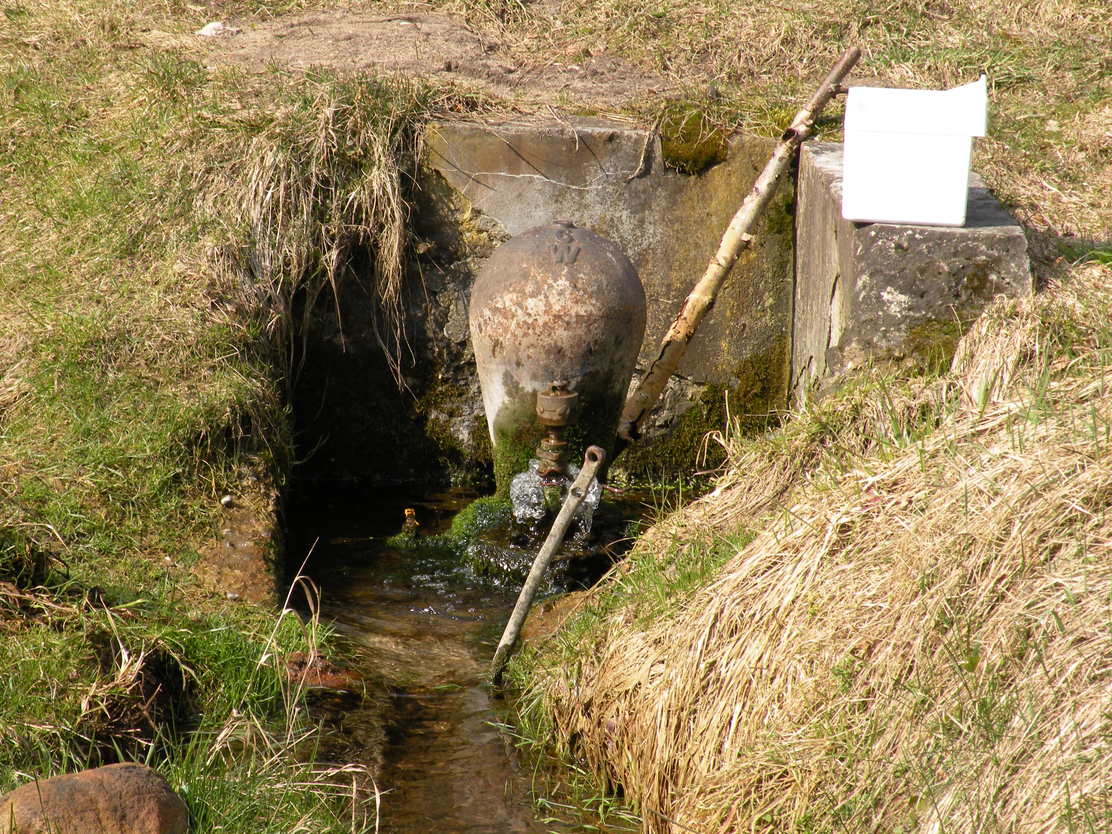 Kajny, taran wodny